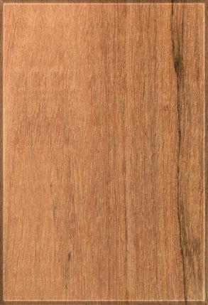 Foto da face tangencial da madeira freijó, corte em tábuas.